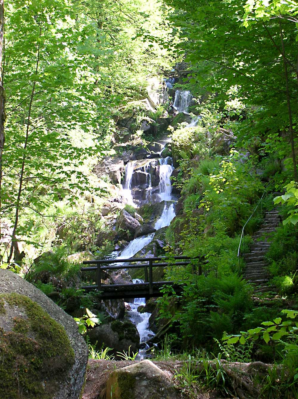 bei privater Wanderung aufgenommen